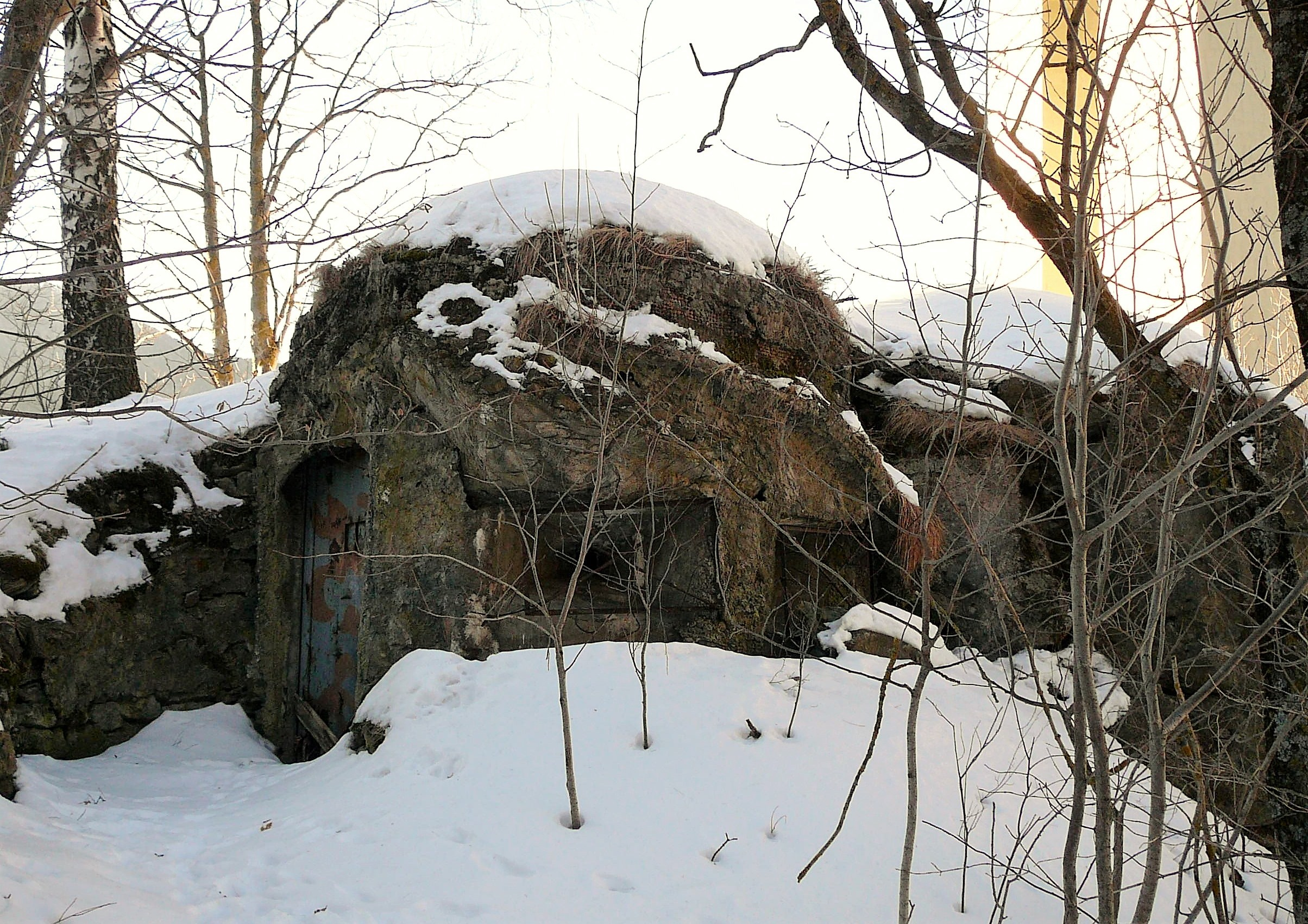 Opera 2, Tenne-Novale